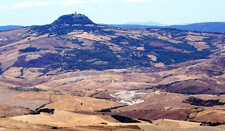 Panorama a est di Castell'Azzara (GR) con sullo sfondo il poggio di Radicofani (SI), Tuscany (Italy)